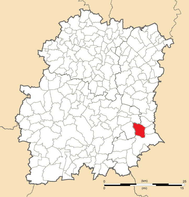 Carte de position de Moigny-sur-École en Essonne (91)